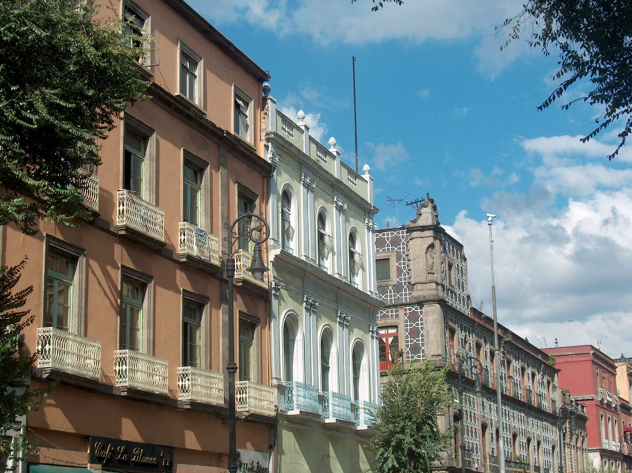 casas del centro